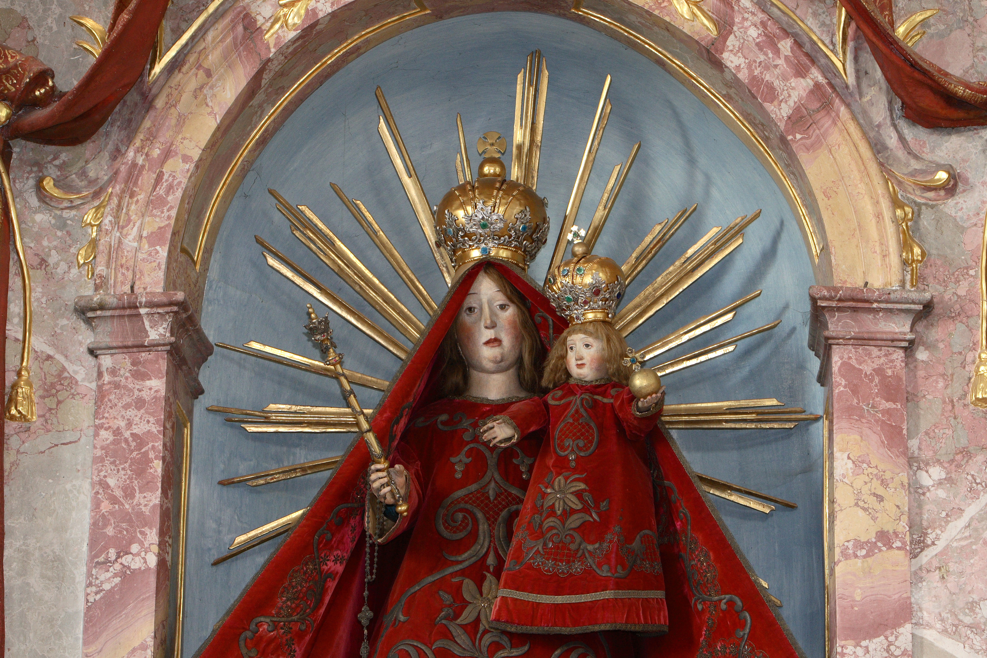 Im Innenraum der Heuwinklkapelle in Iffeldorf